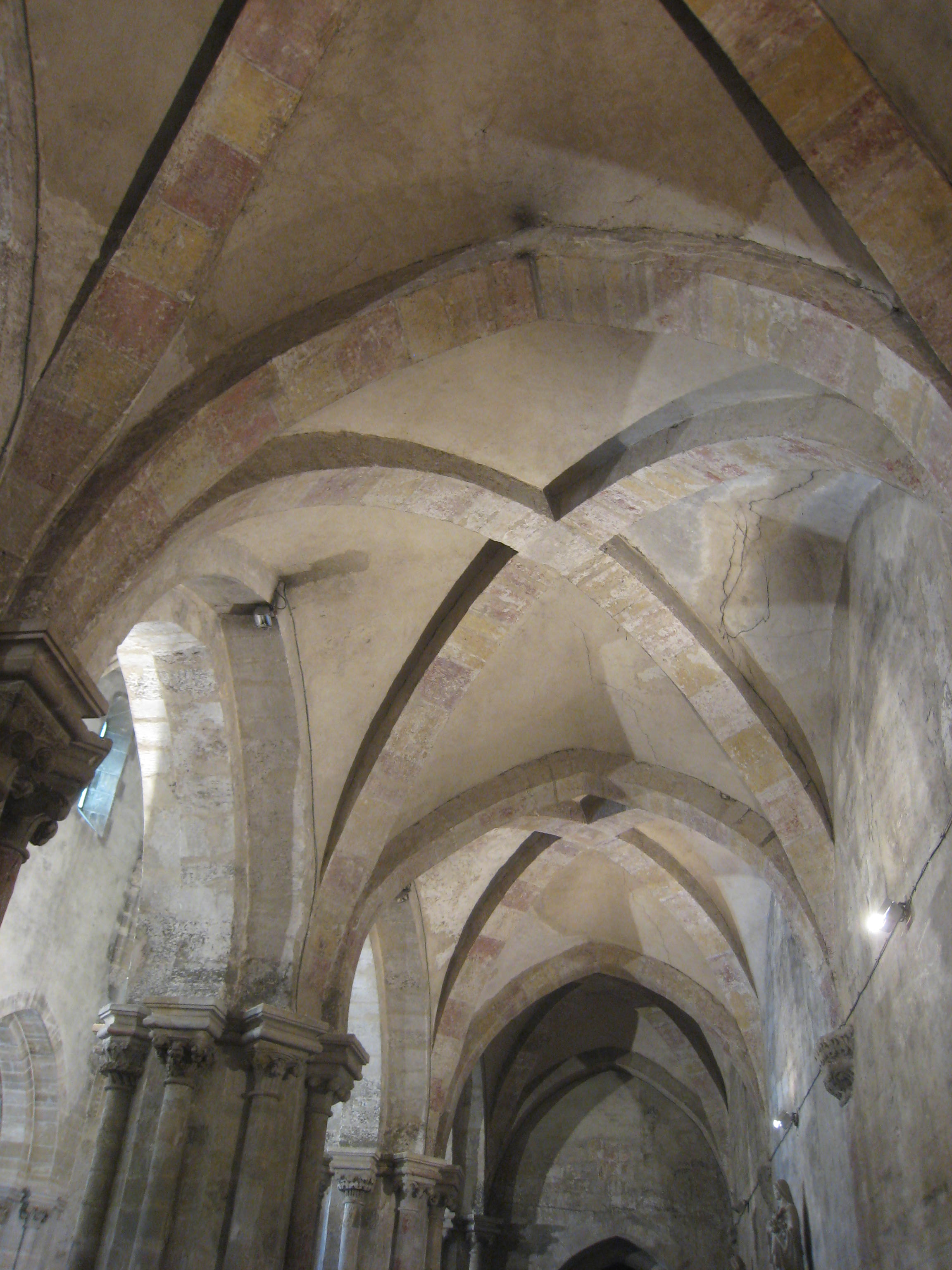 Cerkev sv. Jurija, Ják, Madžarska; strop severne stranske ladje.